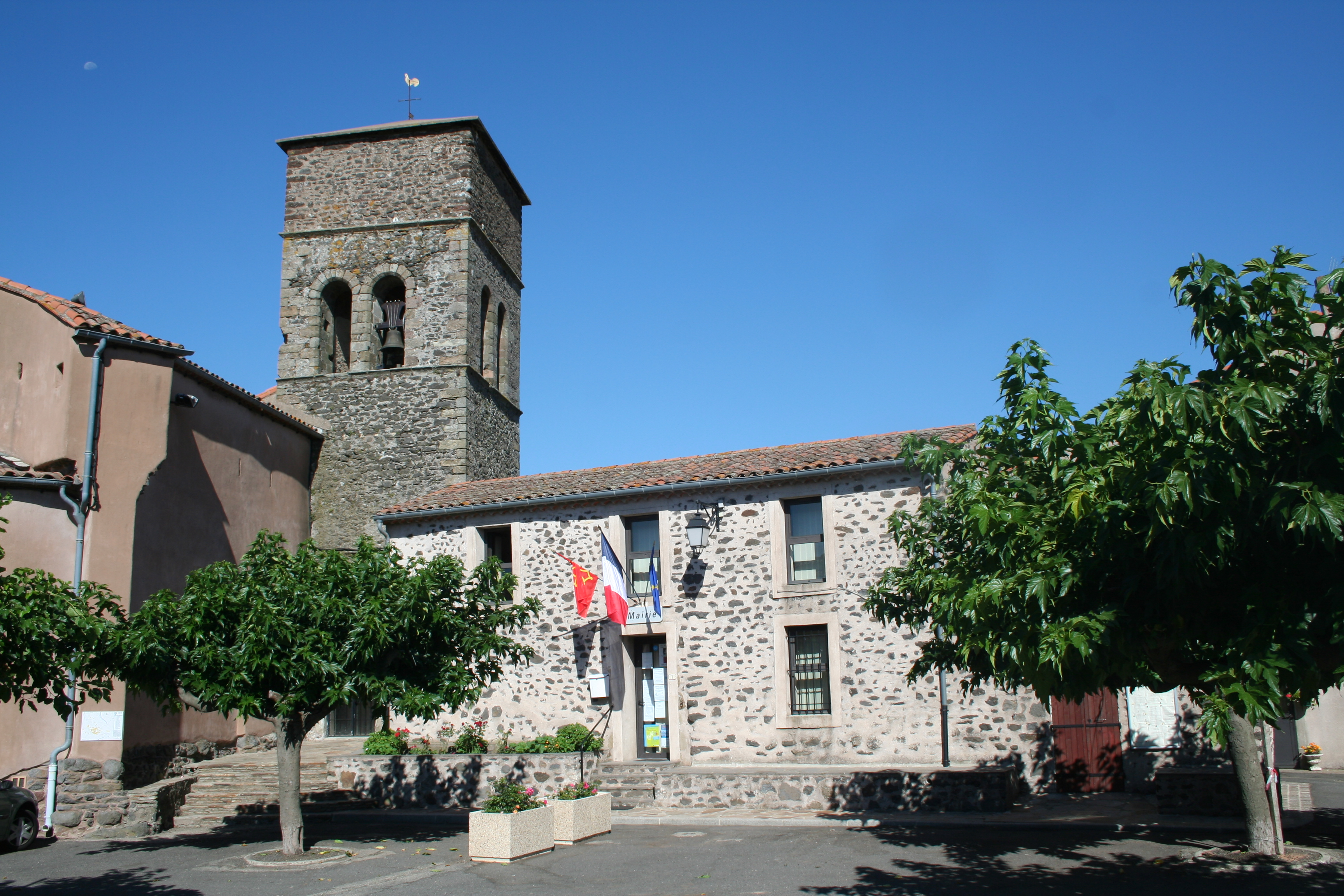 Carlencas (Hérault) - église Saint-Martin, mairie.